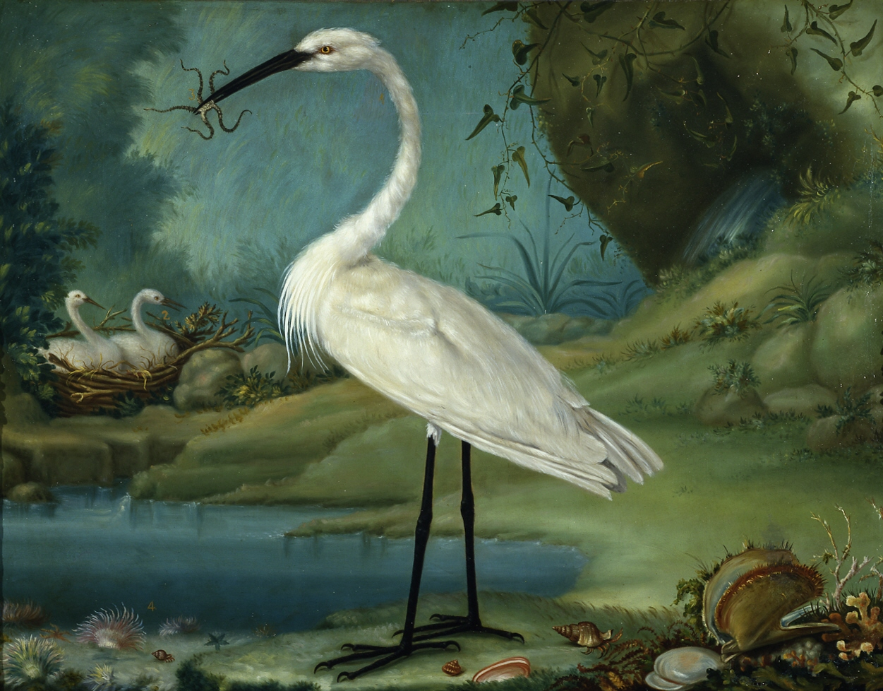 Cristóbal Vilella, Garza de Mallorca en su nido y moluscos, óleo sobre lienzo, 63 x 82 cm, Madrid, Real Academia de Bellas Artes de San Fernando. Procedente de la colección de Manuel Godoy, ingresó en la Academia en 1816